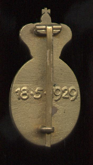 Bayern, Haus Wittelsbach, Ehrenzeichen zum 60. Geburtstag von Kronprinz Rupprecht, 1929, Rückseite